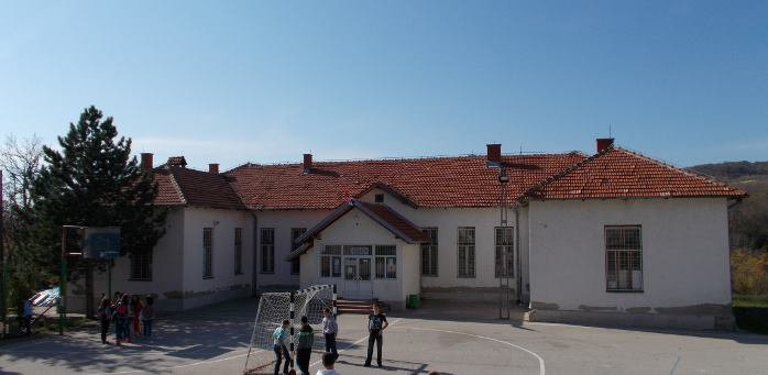 osnovna skola u selu malca